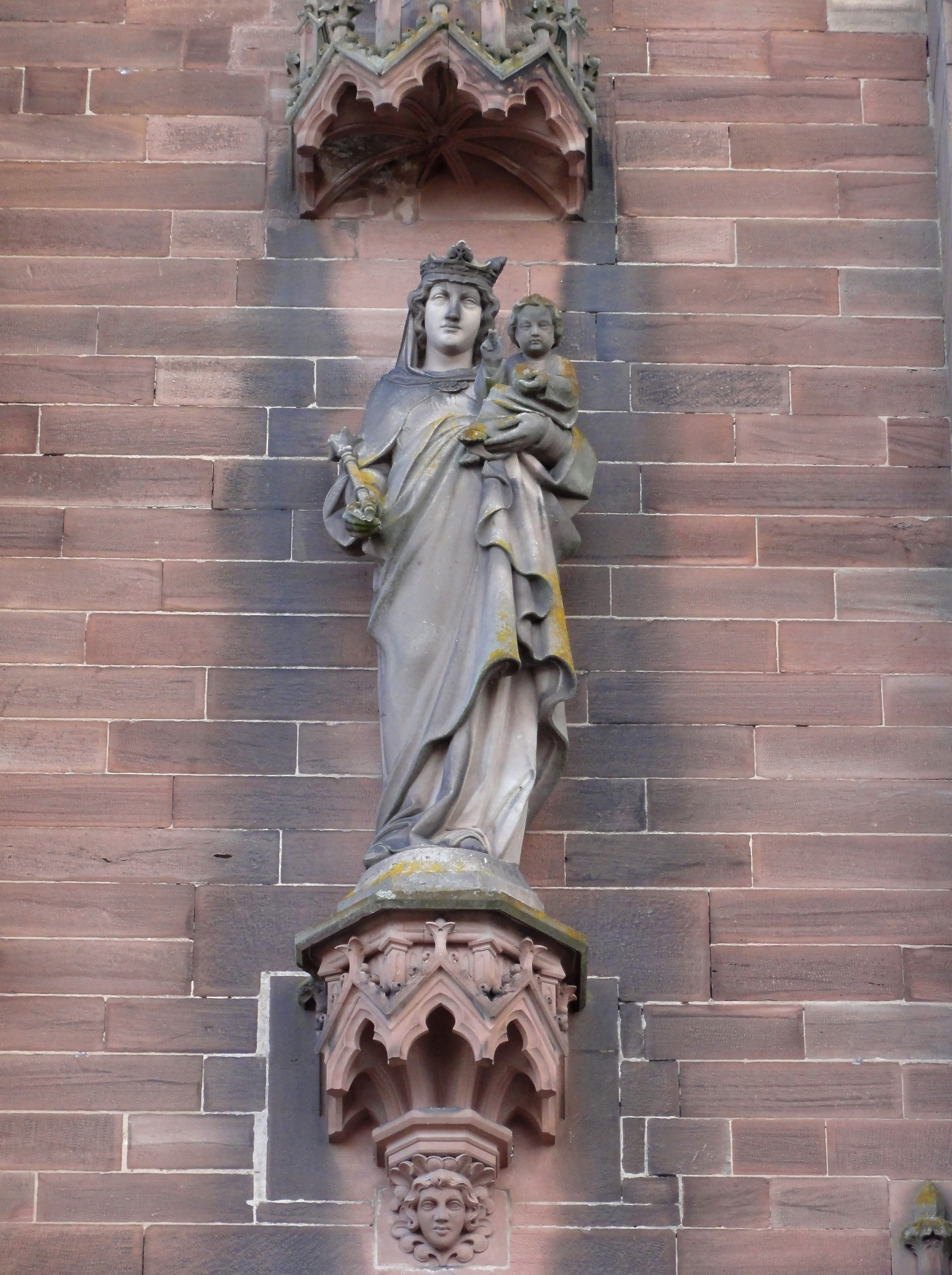 Alsace, Bas-Rhin, Haguenau, Basilique Notre-Dame-des-Douleurs de Marienthal (ancien Prieuré des Guillemites) (IA00062022). Statue de la Vierge à l'enfant (1866, Sauer)